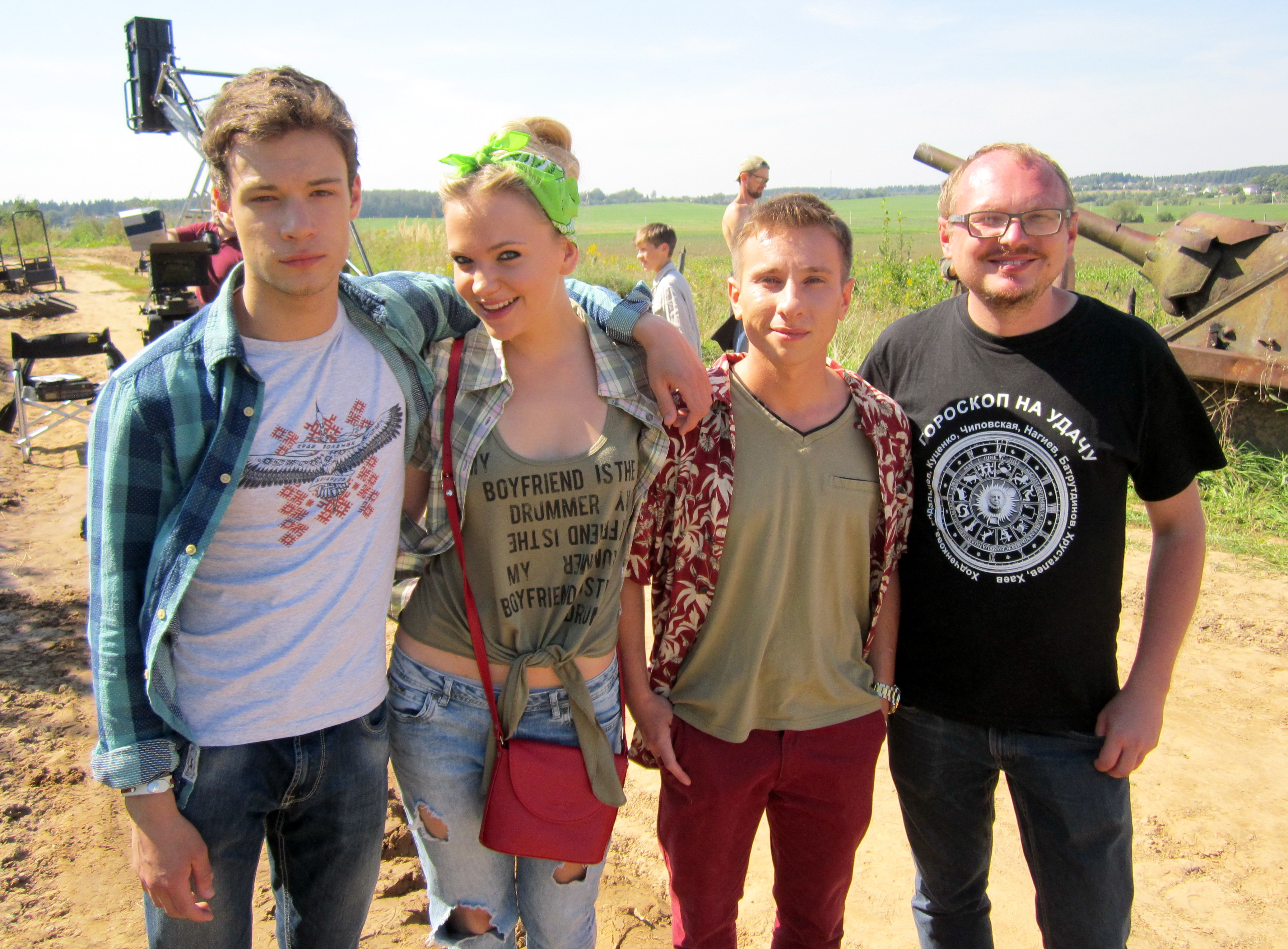 Съёмки фильма «PARTY-zan фильм». Главные герои с режиссером-сценаристом фильма Андреем Курейчиком. "Линия Сталина", Минский район.